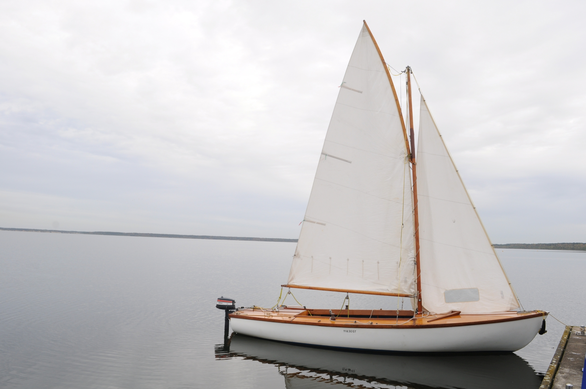 Aufgeriggte Fly Tour, gaffelgetakelt